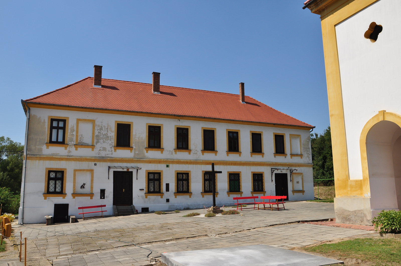 Görögkeleti szerb apácakolostor (Grábóc, Zrínyi u. 49.)